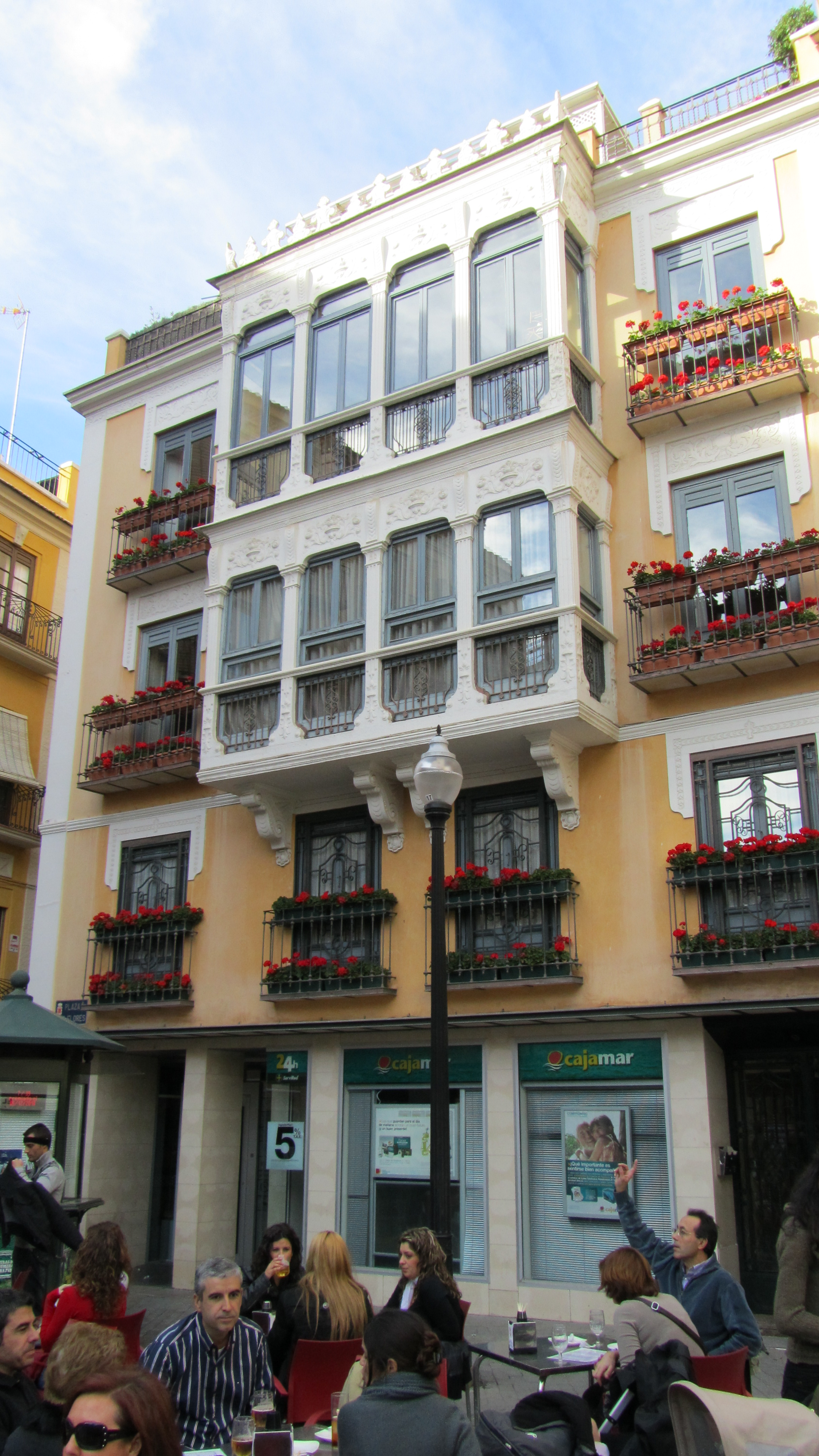 Edificio de la Plaza de las Flores de Murcia (España)